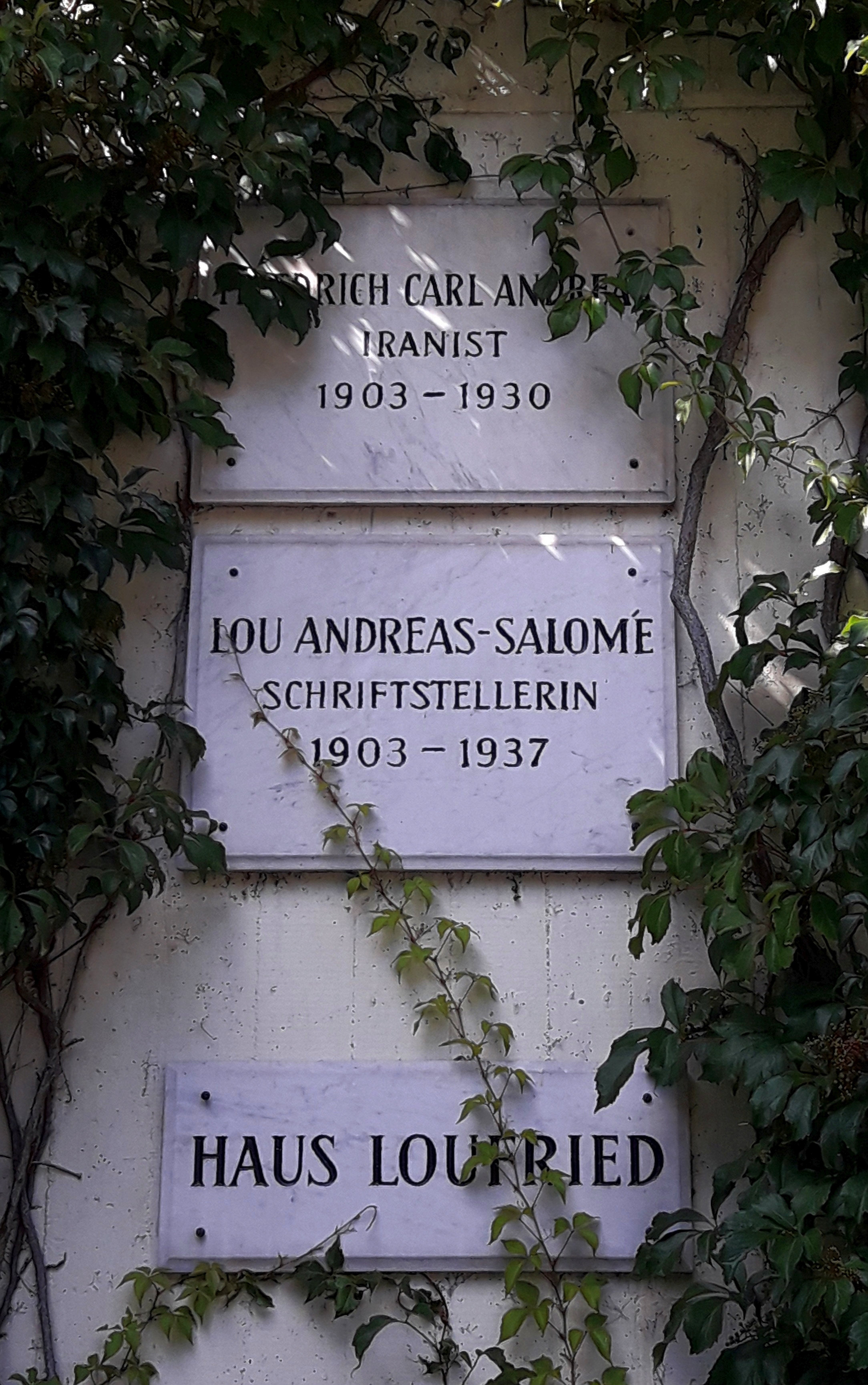 Göttingen (Herzberger Landstraße 101, 37085 Göttingen): Göttinger Gedenktafeln für Friedrich Carl Andreas und Lou Andreas-Salomé sowie Hinweisschild auf das ehemals an dieser Stelle stehende Haus "Loufried"